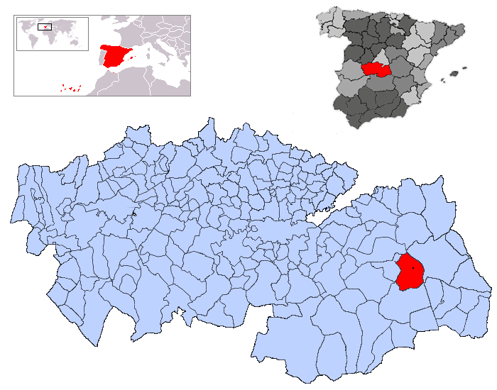 Lillo en la provincia de Toledo